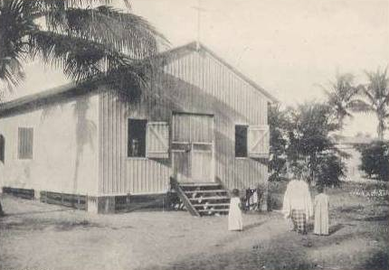 Ancienne église de Grand-Bassam, edifiée en 1896, remplacée en 1910 par la Cathédrale Sacré-Cœur.